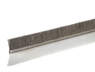 Streifen- und Abdichtbürsten können sich flexibel einer Oberfläche anzupassen und halten dabei noch absolut dicht. Die Anpassungsfähigkeit des Bürstenbesatzes gleicht dabei Unebenheiten oder Höhenunterschiede aus. Mit diesen Bürsten kann aber auch das Gegenteil erzielet werden. Durch eine harte, widerstandsfähige Besatzart wird ein aggressiver Bürsteffekt erreicht.